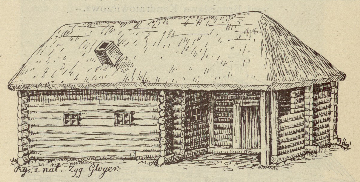 Беларуская (тарашкевіца): Дарагічын (Darahičyn). Хата